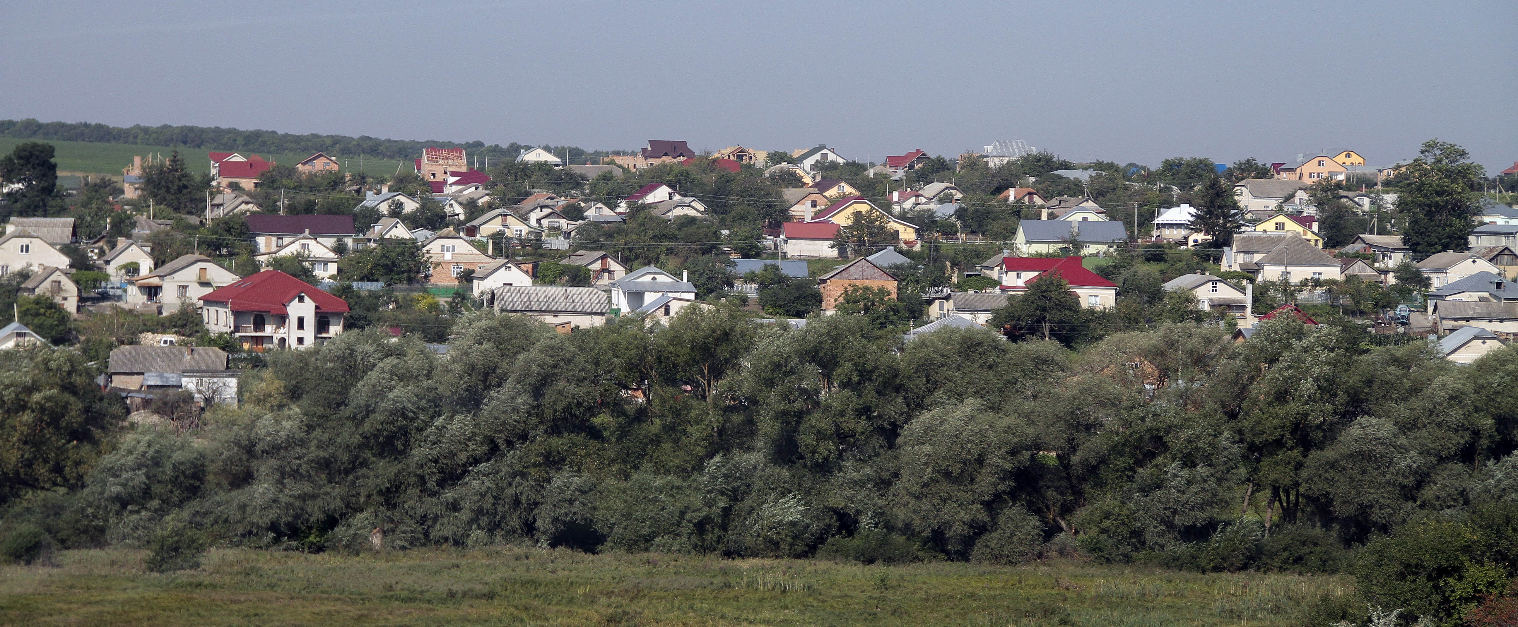 Колодне (Збаражский район)